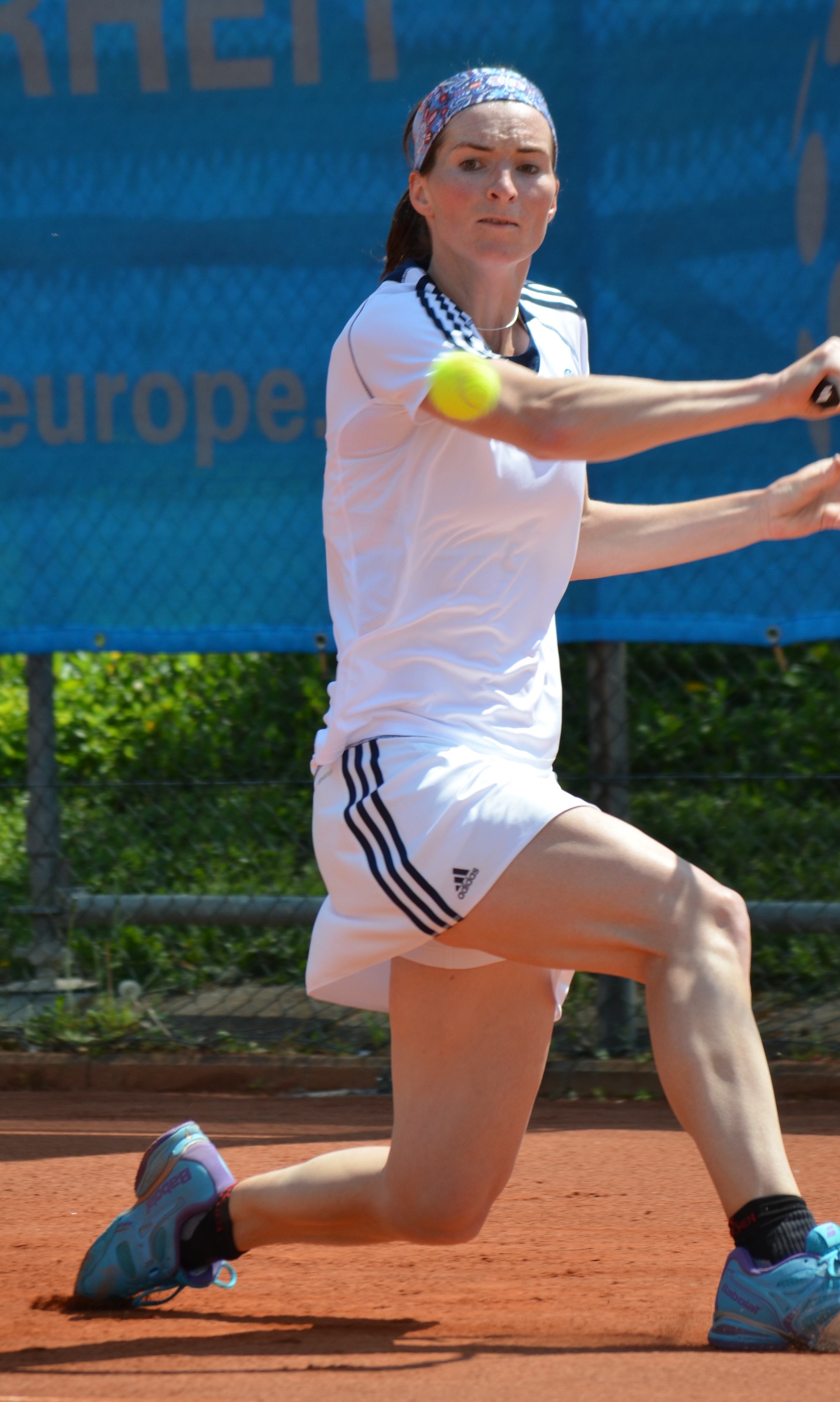 Kathrin Wörle-Scheller im Match gegen Barbora Krejcikova in der Bundesliga-Begegnung Regensburg gegen Berlin